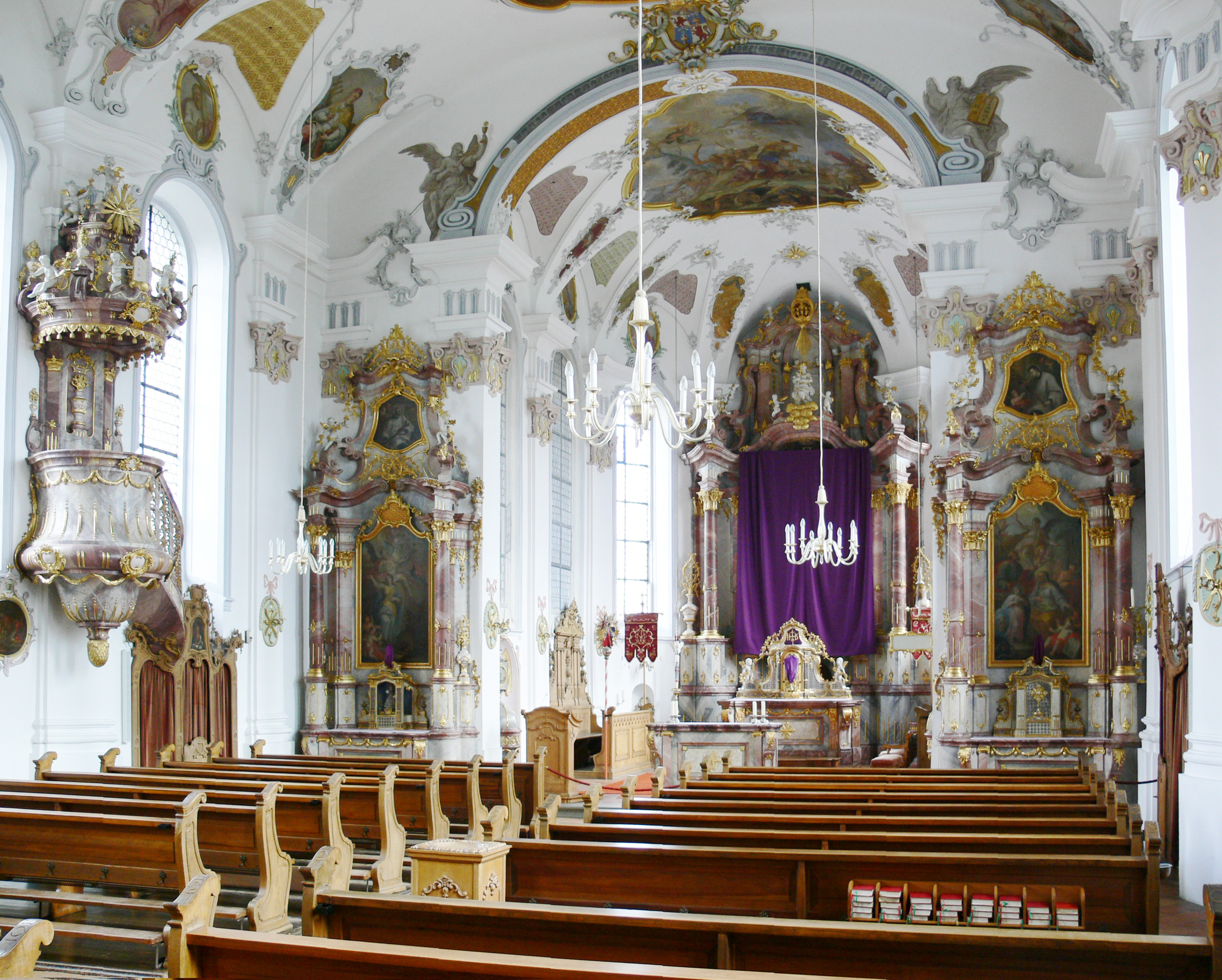 Innenansicht Pfarrkirche St. Oswald, Otterswang Bad Schussenried, Landkreis Biberach, Baden-Württemberg